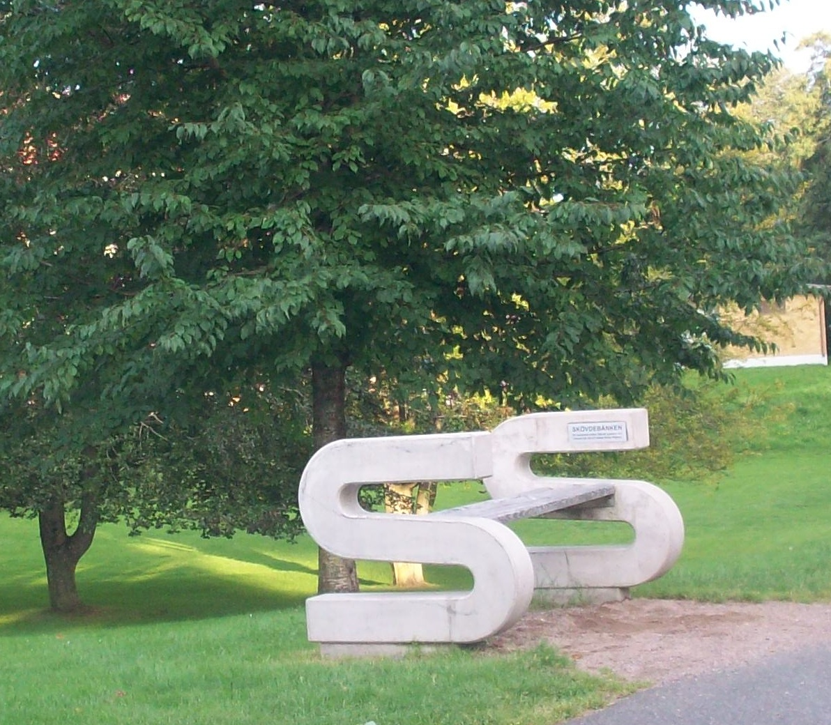 En av skövdes bänkar som ligger på ett 30-tal platser i Stan